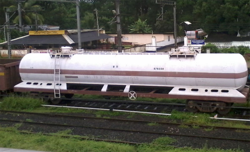 പുതിയ തരം പെട്രോൾ വാഗൺ, ഇന്ത്യൻ റെയിൽവേ